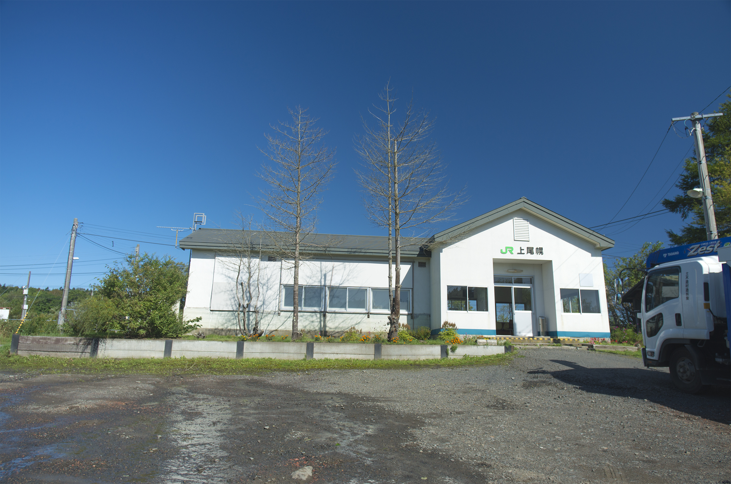 北海道旅客鉄道根室本線上尾幌駅駅舎